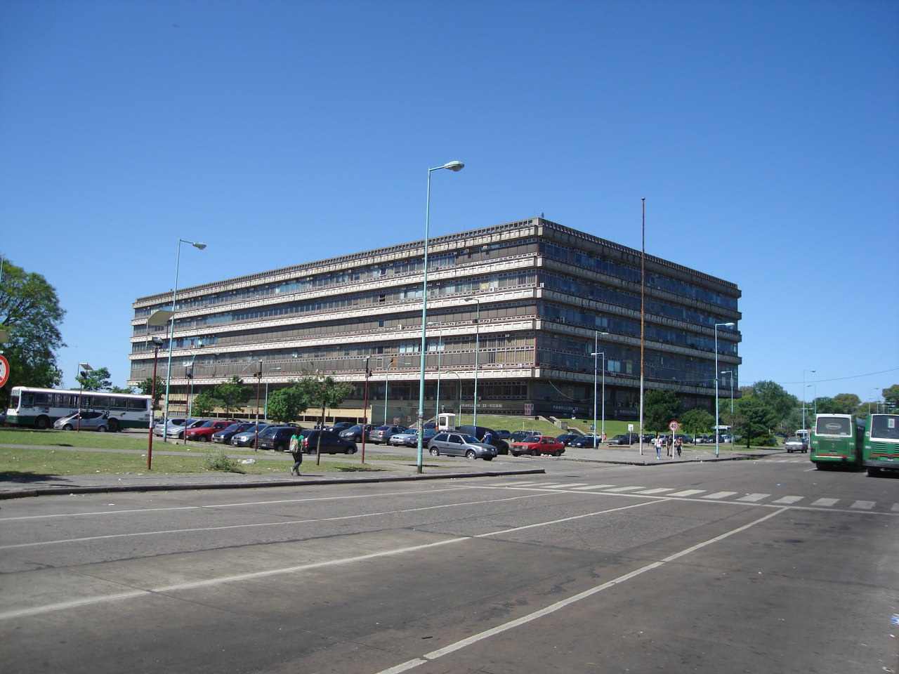 Vista del Pabellón II de la Ciudad Universitaria de Buenos Aires, sede de la Facultad de Ciencias Exactas y Naturales (FCEyN) de la Universidad de Buenos Aires.